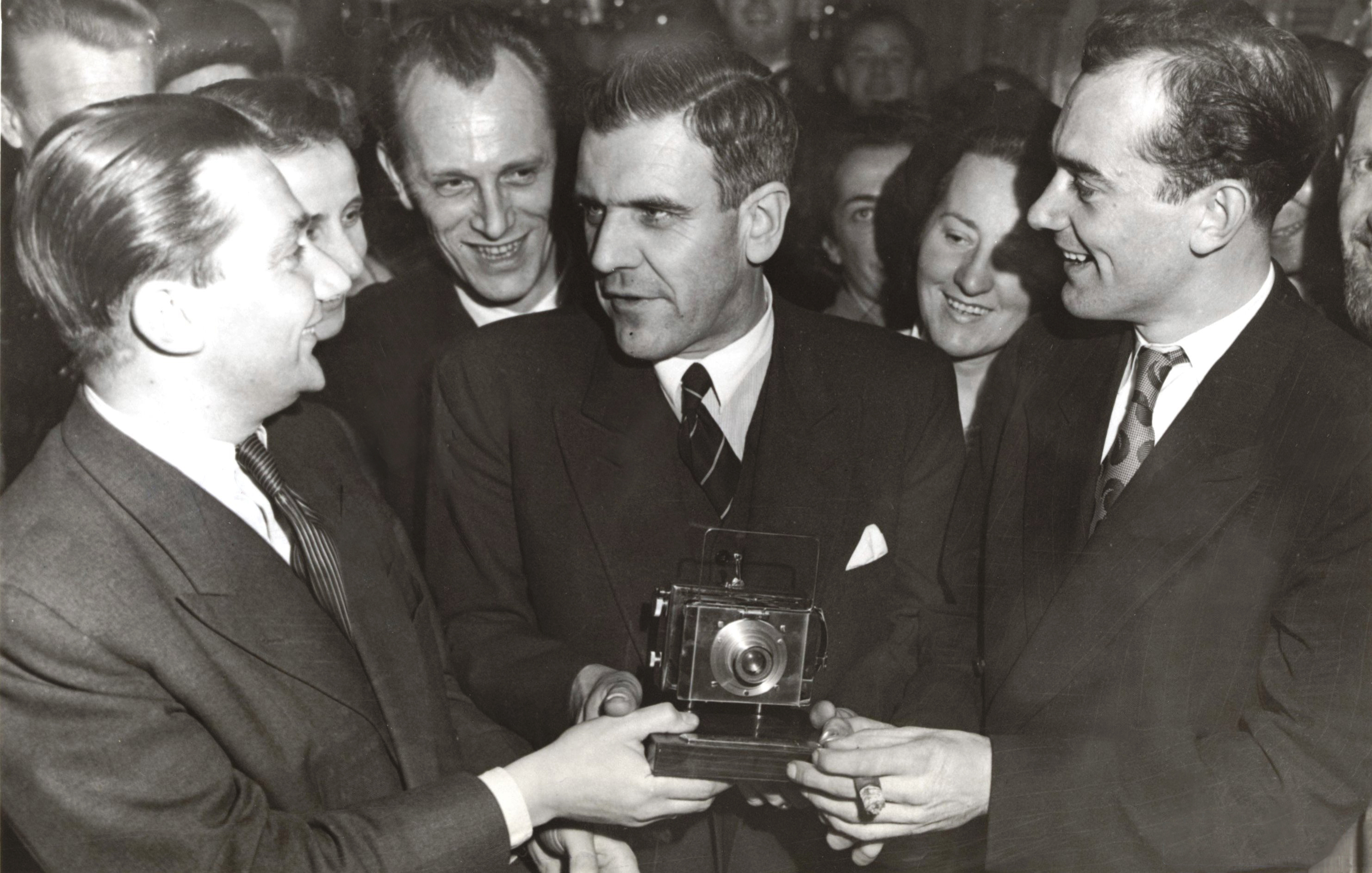 Uitreiking van de Zilveren Camera aan Ben van Meerendonk (links) door B. Merk (rechts) en A.F.C. de Casembroot (midden). 21 oktober 1950